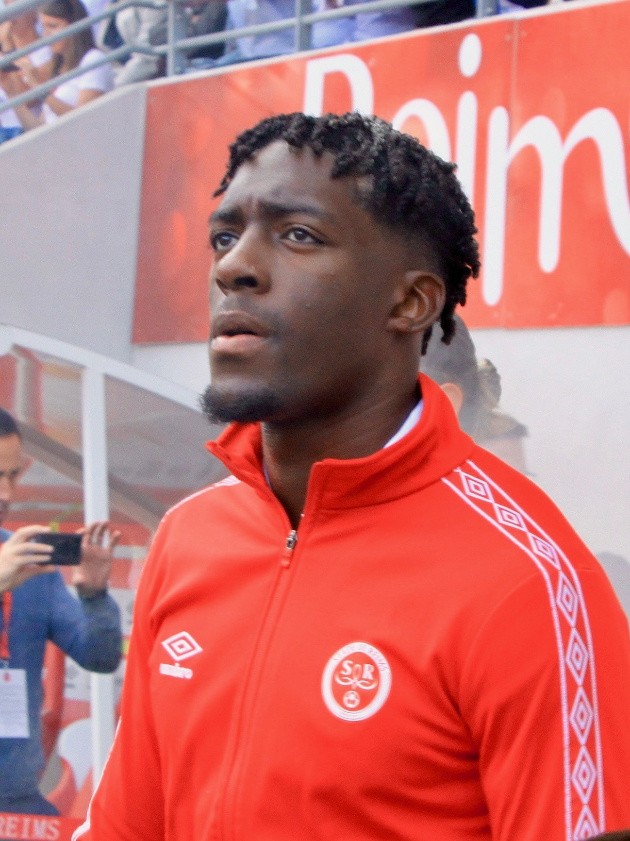 Axel Disasi, le 1er septembre 2019, avant Reims - Lille, Ligue 1.